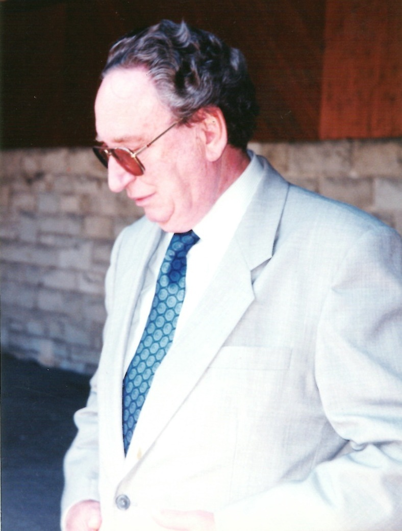 Richard Mořic Belcredi